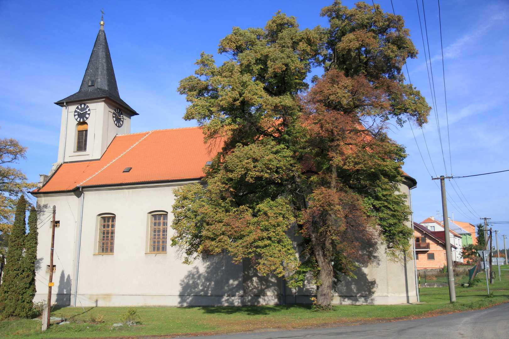 Kostel Zvěstování Panny Marie, Myslejovice, okres Prostějov.